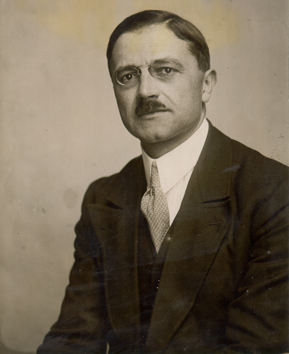 Leonid Pitamic, Slovene jurist, academic and diplomat.